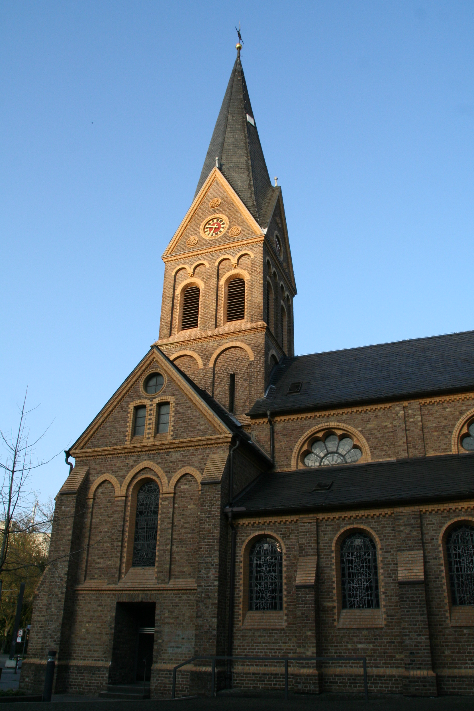 Bonn-Dottendorf, kath. Pfarrkirche St. Quirinus